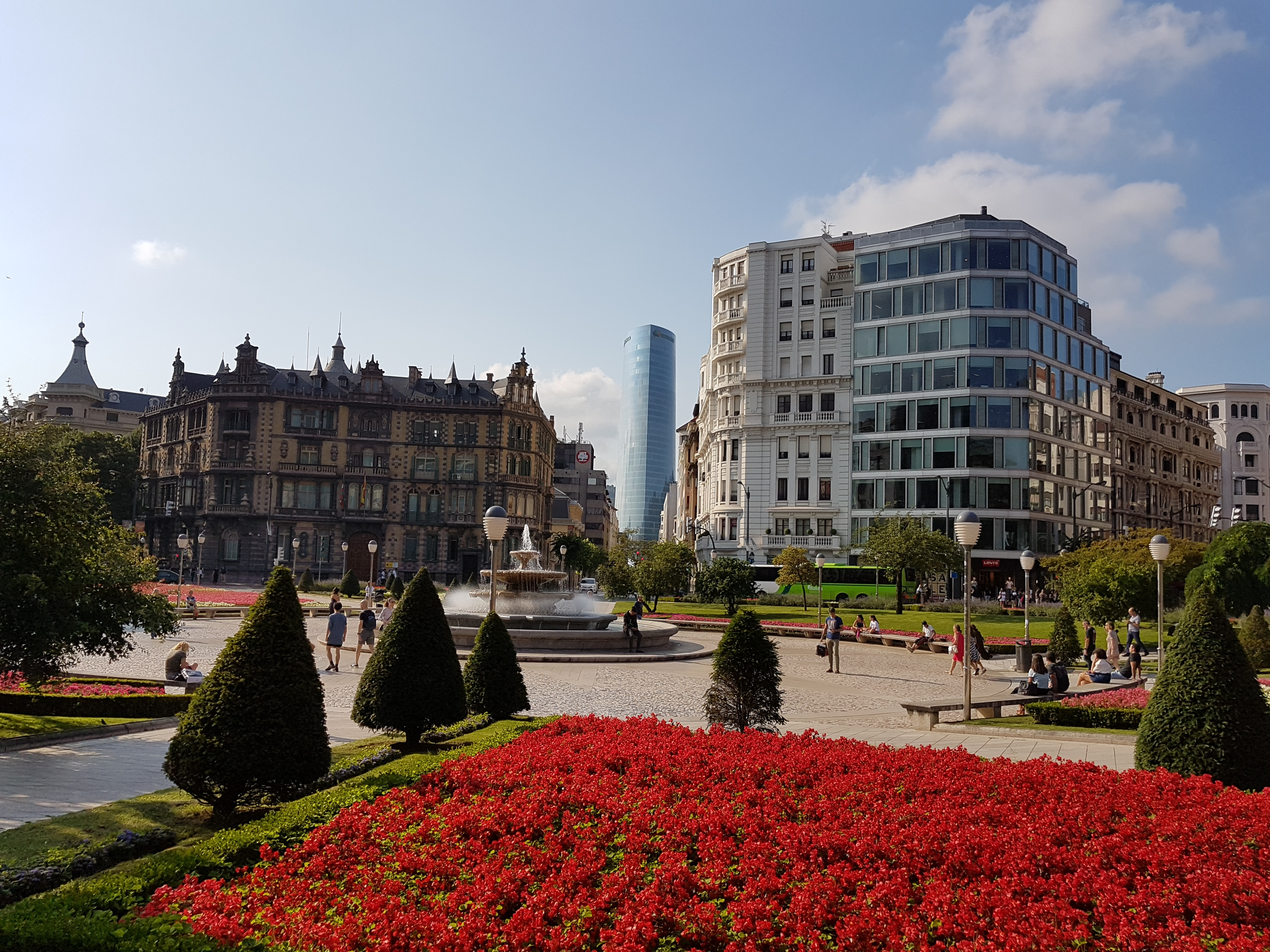 Plaza de Federico Moyúa.